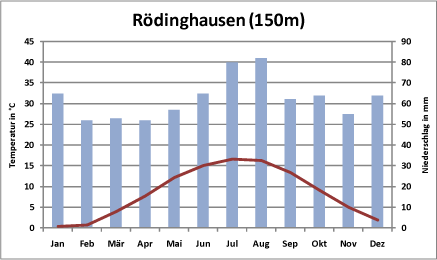 Climate diagramme for Rödinghausen, Germany